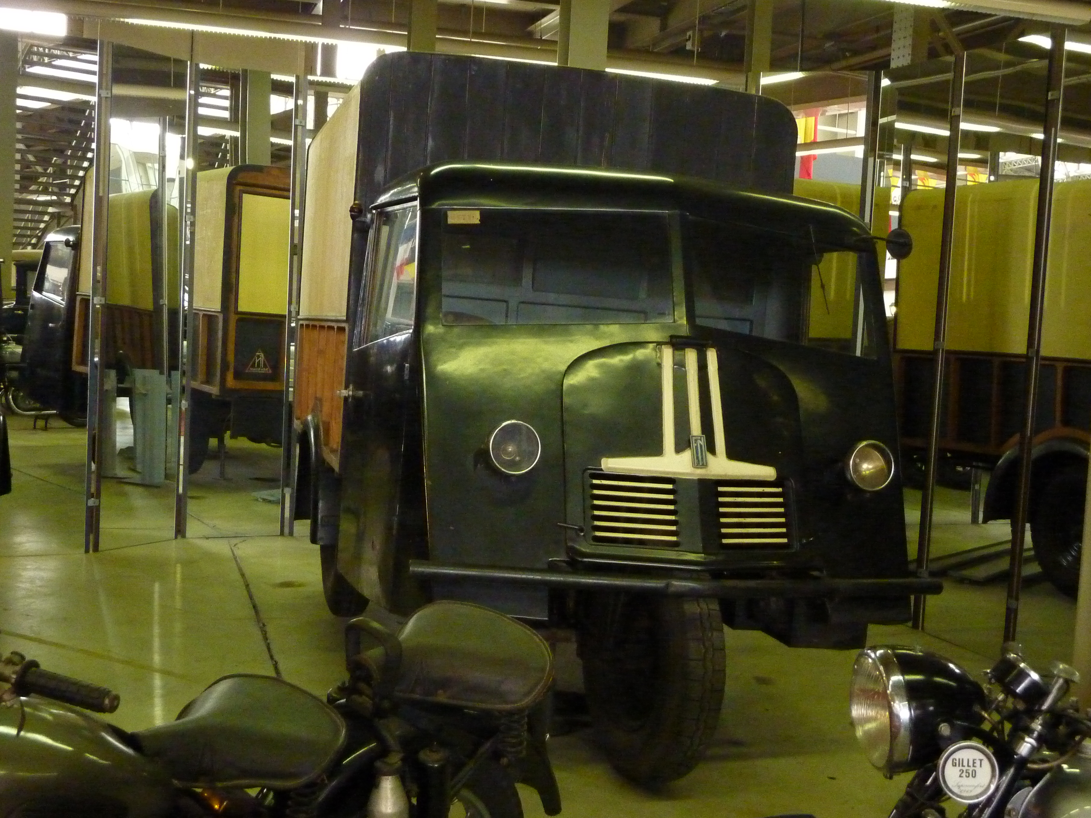 Tricar FN 1947 à l'Autoworld de Bruxelles.